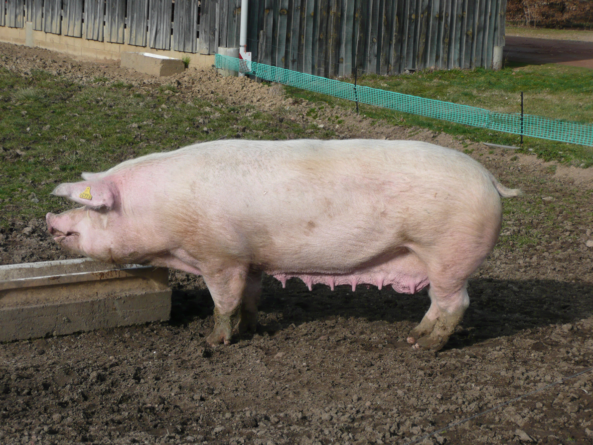 Truie Landrace